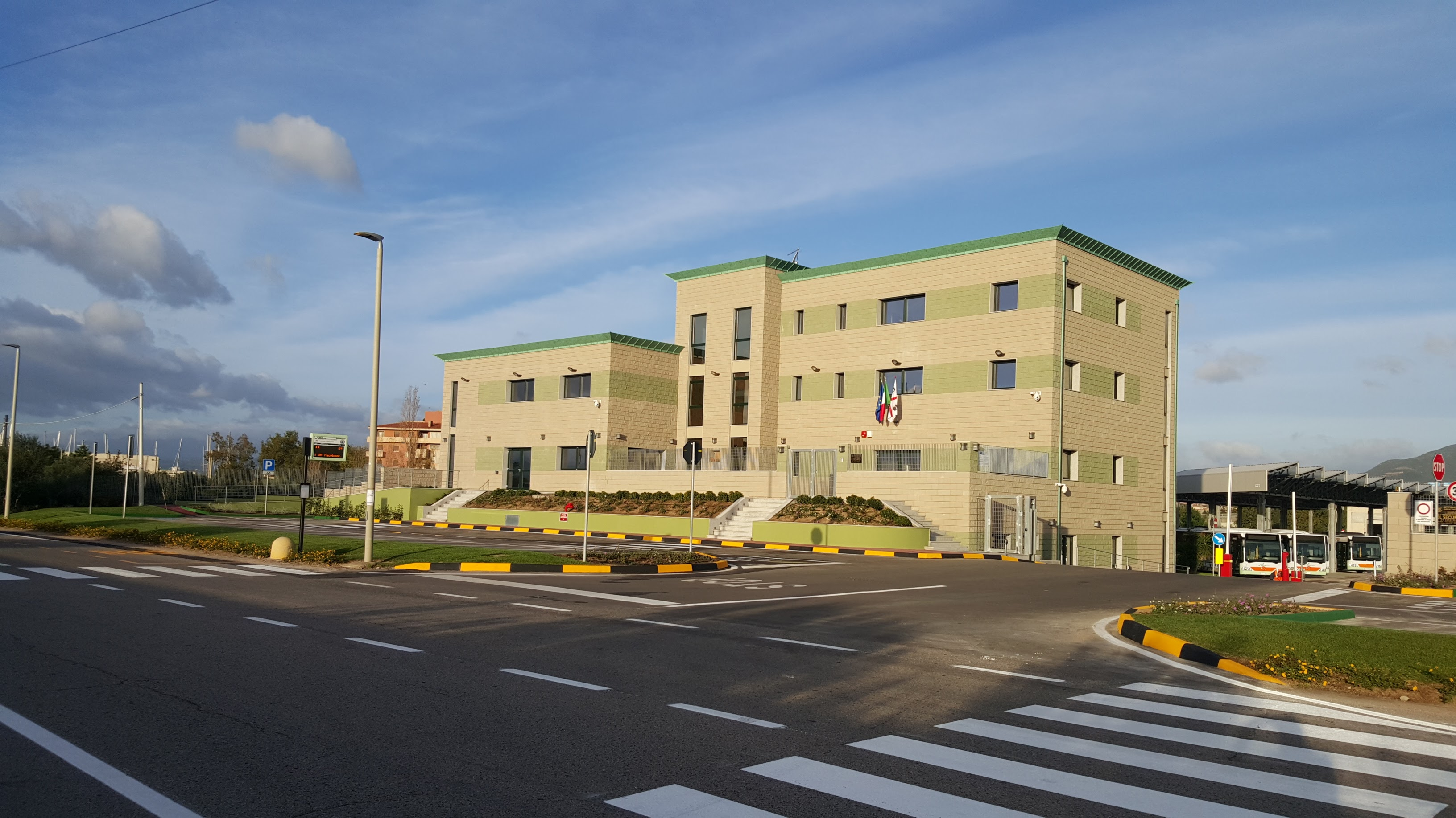 la nuova sede amministrativa